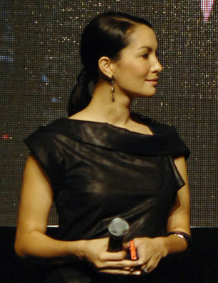 Nadya Hutagalung at the LG New Chocolate Phone launching event, in hong kong, November 2009